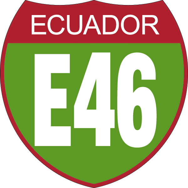 Disco de Identificación Ruta E46